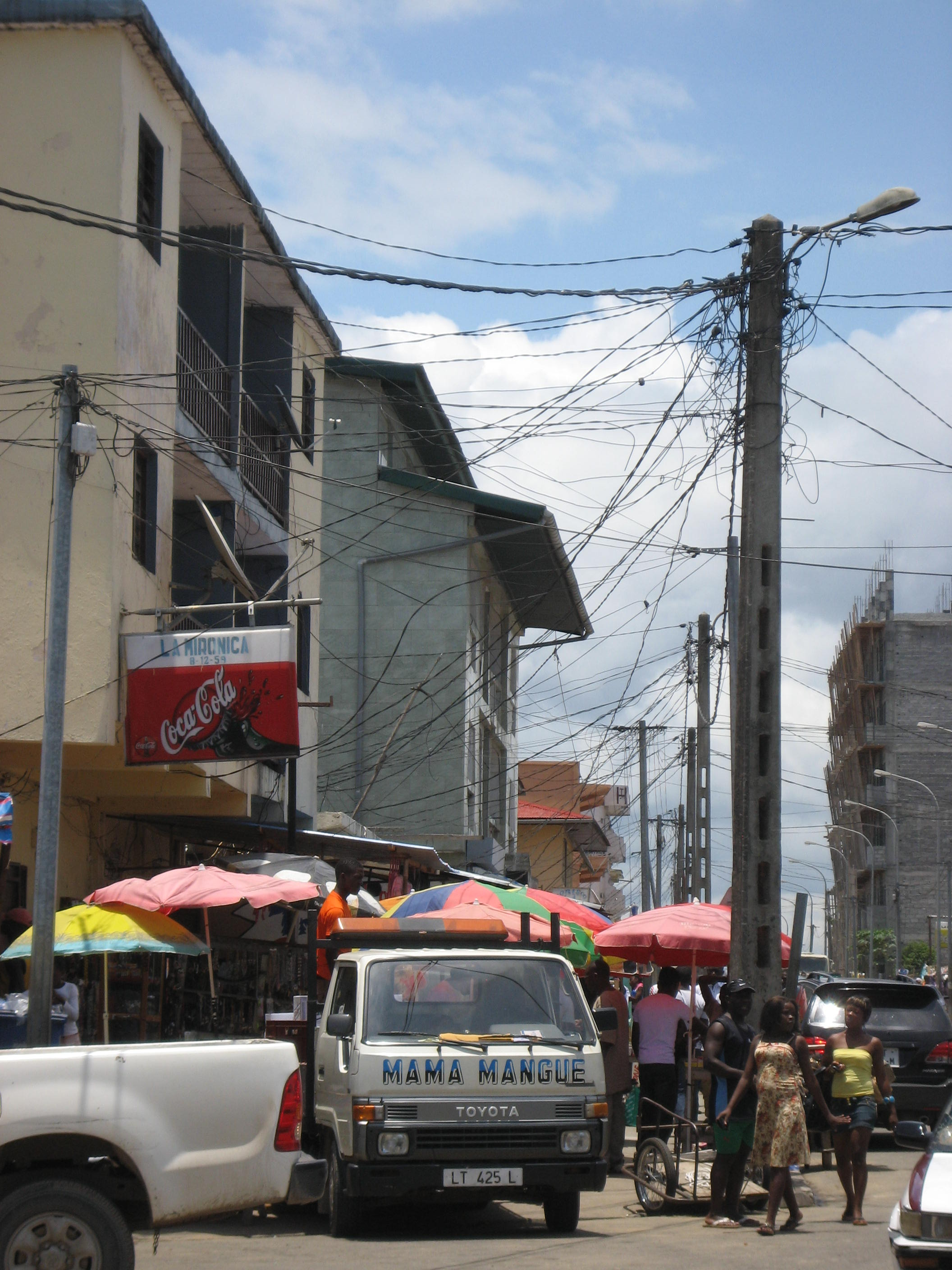 Bata street market